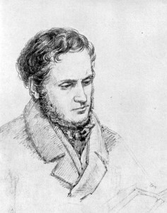 Вацлав Манес (1793 – 1858) — чешский художник, педагог, профессор живописи, директор пражской Художественной академии